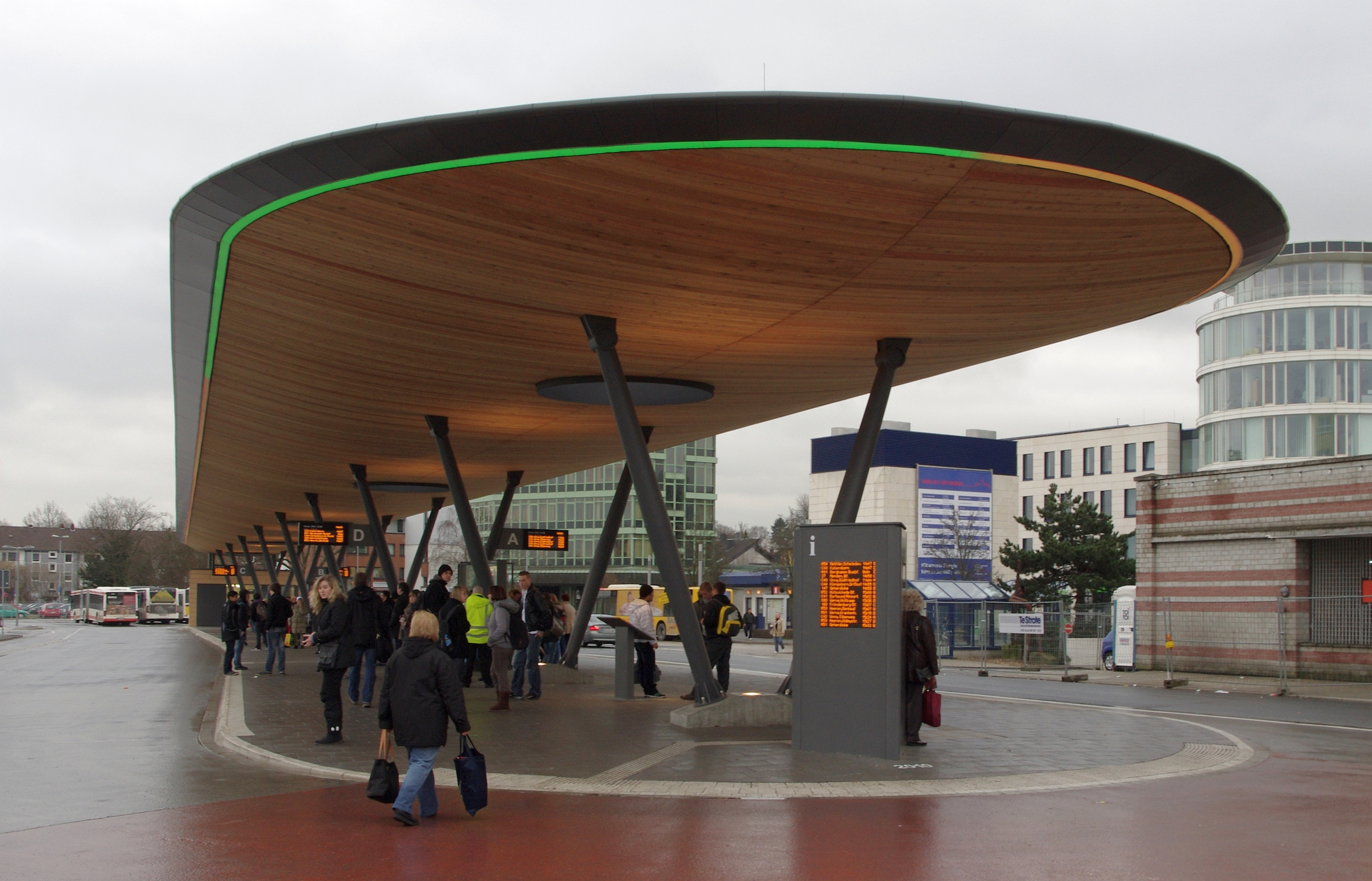 Unna, neuer Bussteig am Bahnhof